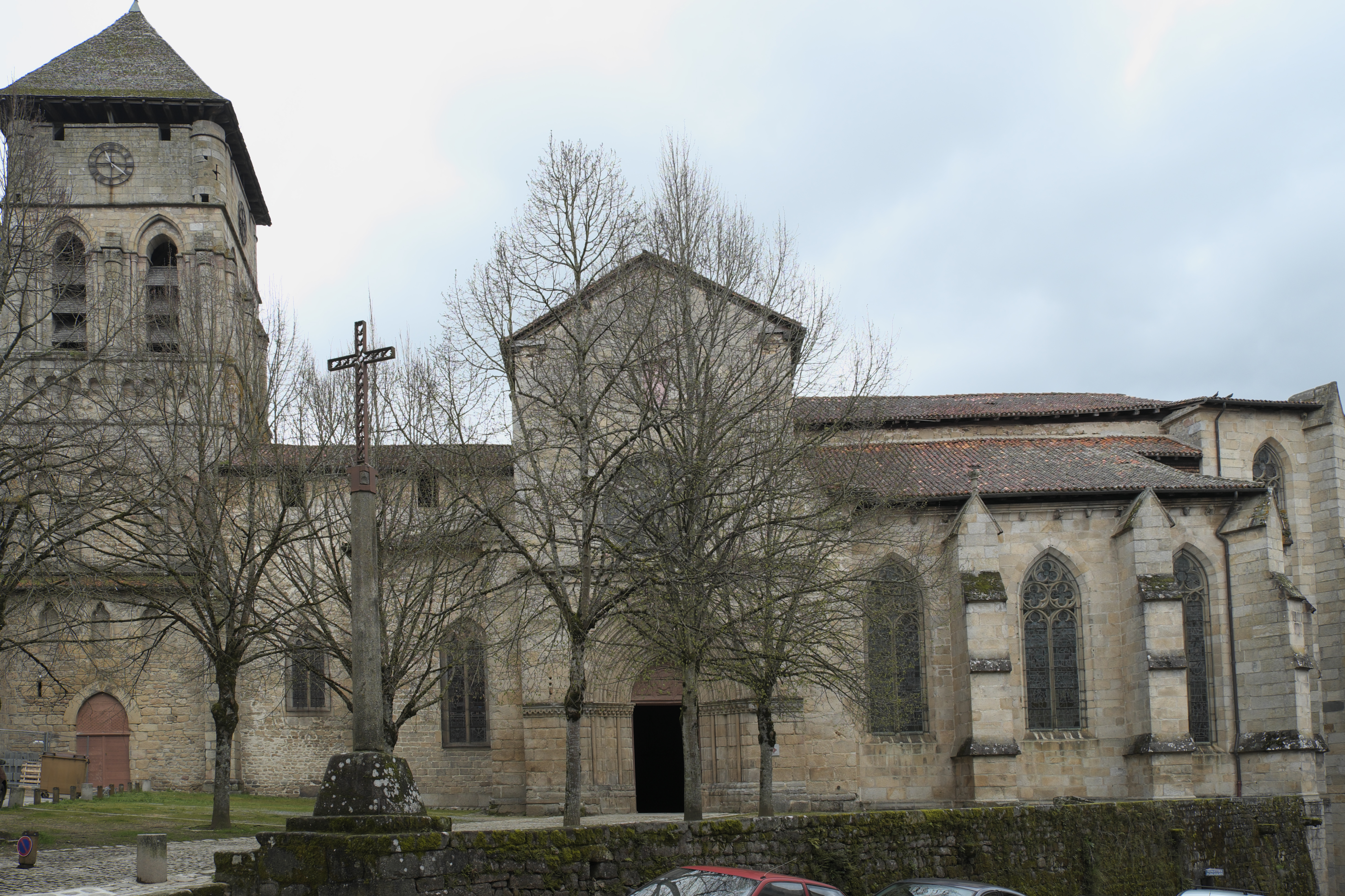 Stiftskirche Saint-Étienne in Eymoutiers im Département Haute-Vienne (Nouvelle-Aquitaine/Frankreich)